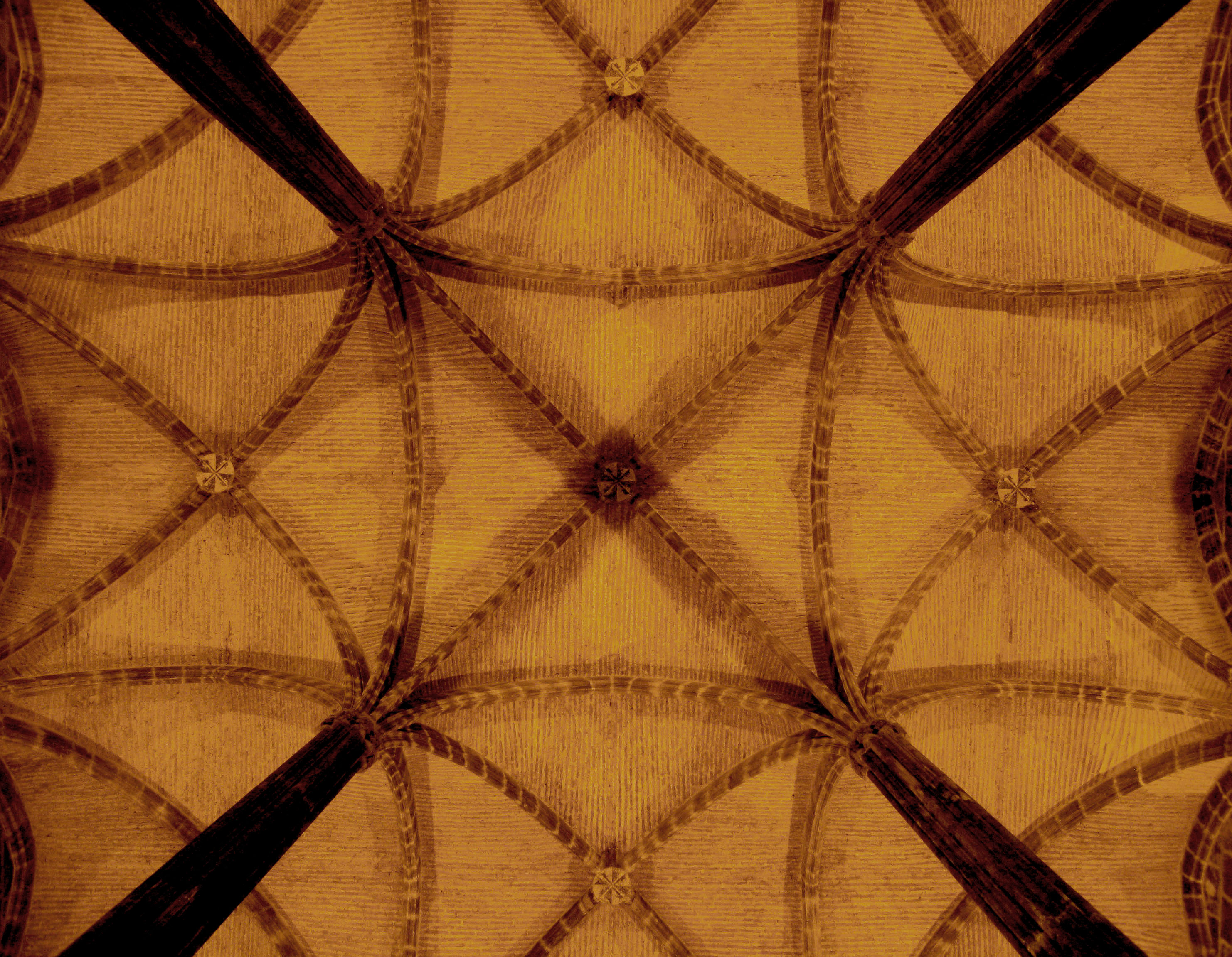 Aula Capitular de sant Domenec (Valencia)